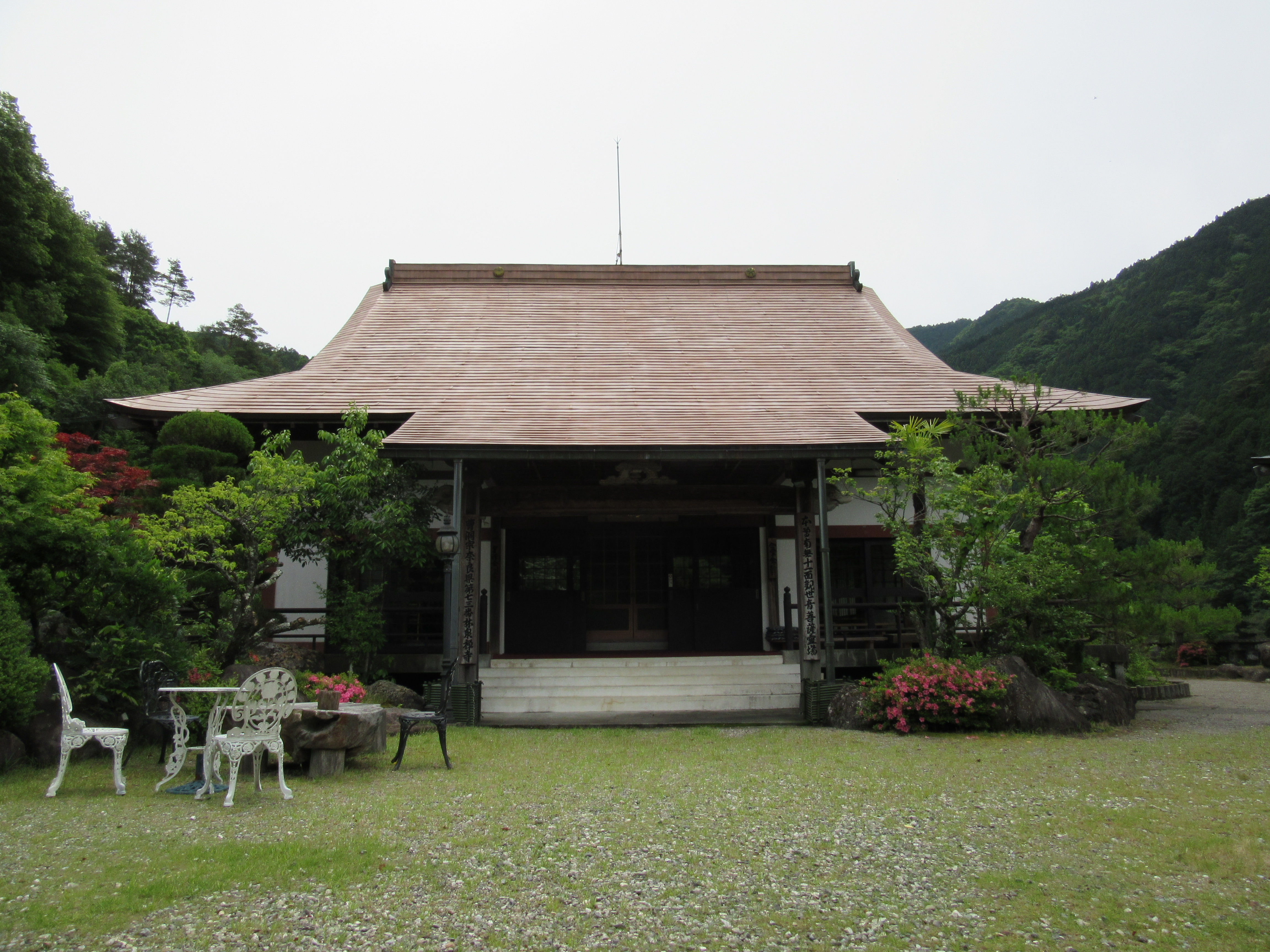 上北山村白川・林泉寺